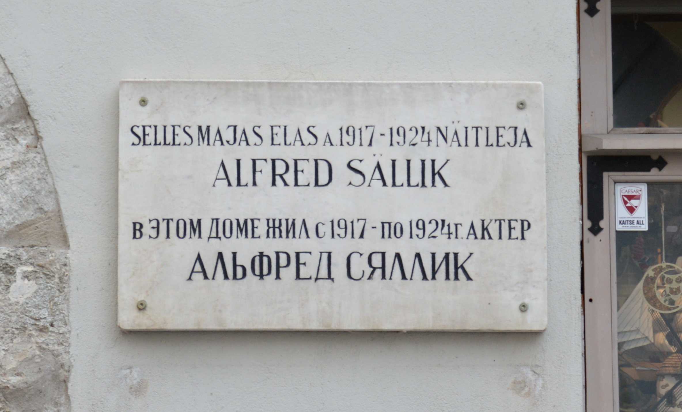 Gedenktafel für Alfred Sällik Raderstraße 18 (Rataskaevu tänav 18